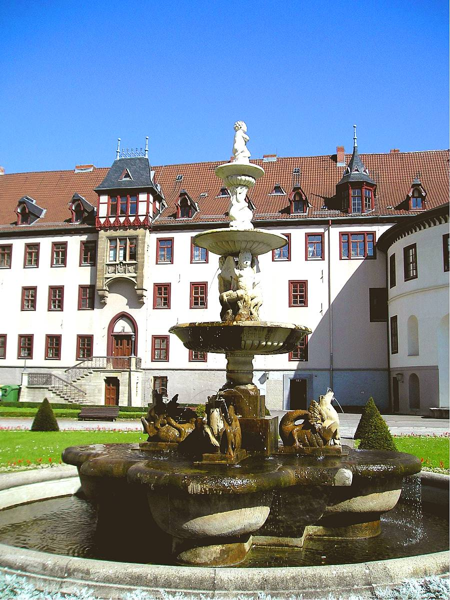 Marmorbrunnen im Schlosshof der Elisabethenburg in Meiningen